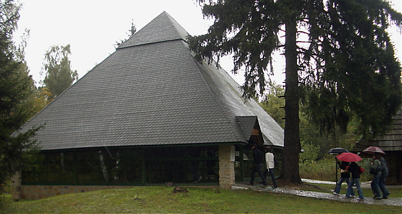 Museumsbau in Krzemionli, Polen